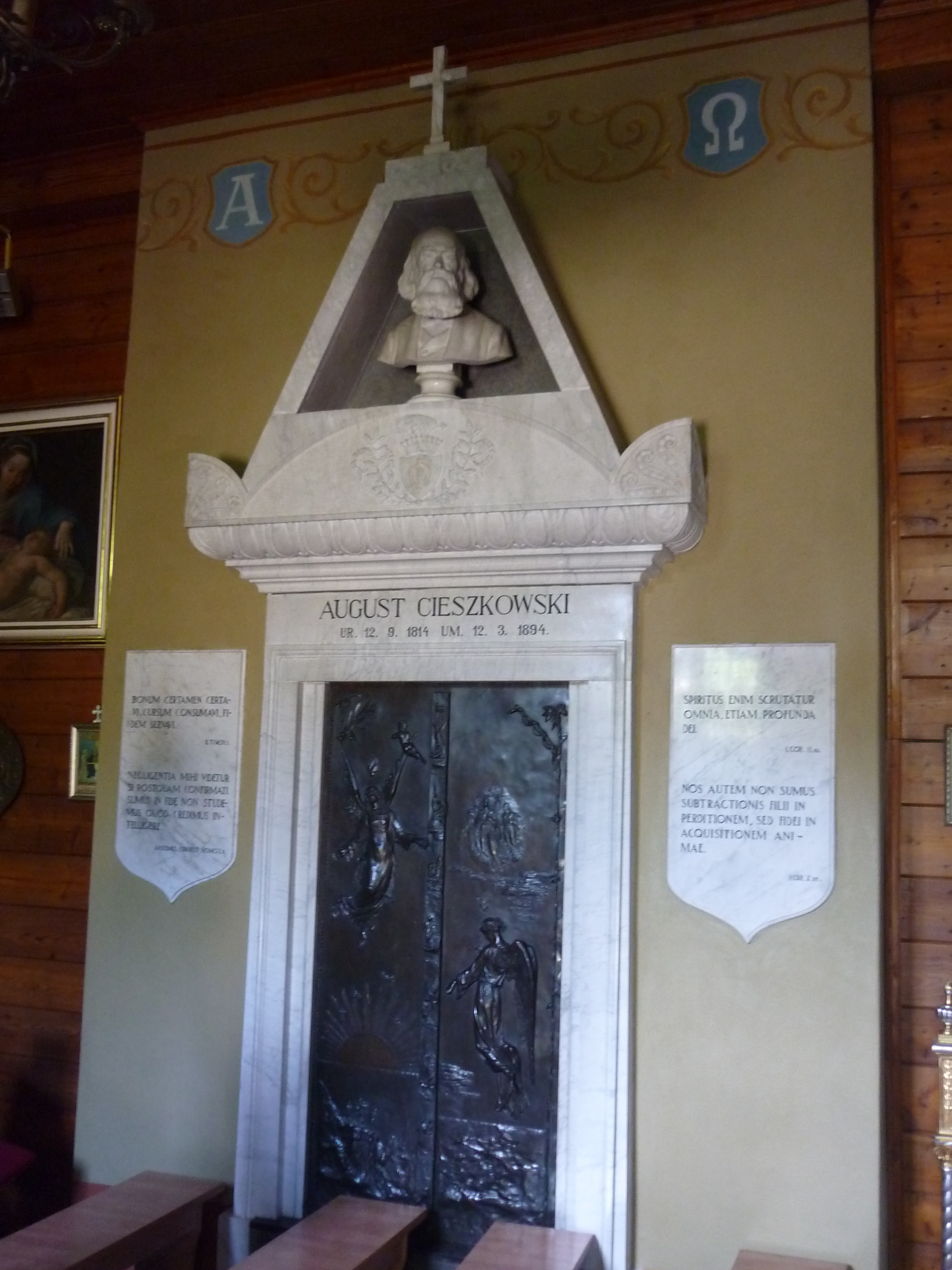 Kościół św. Mikołaja w Wierzenicy